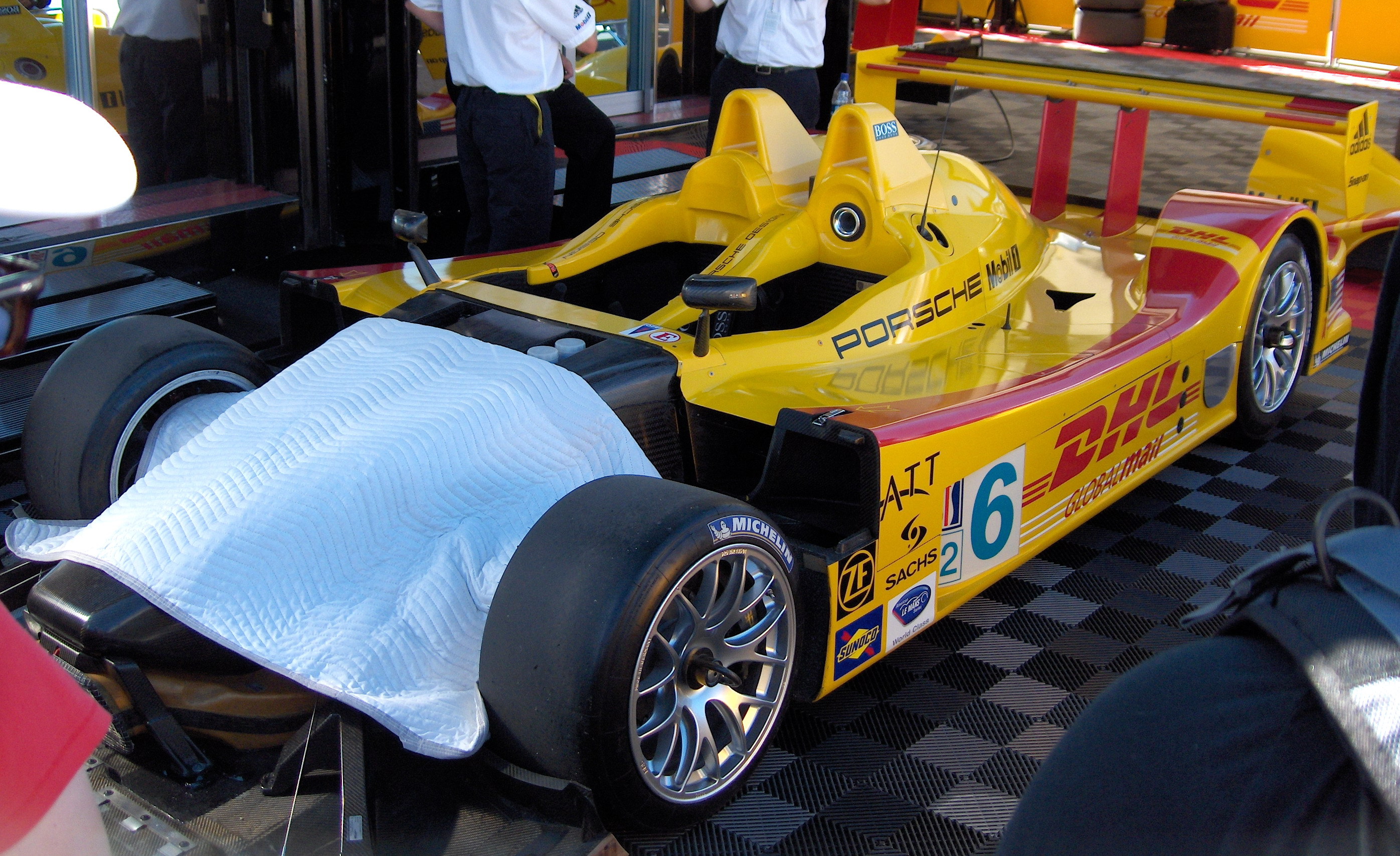 Porsche RS Spyder Race Prep